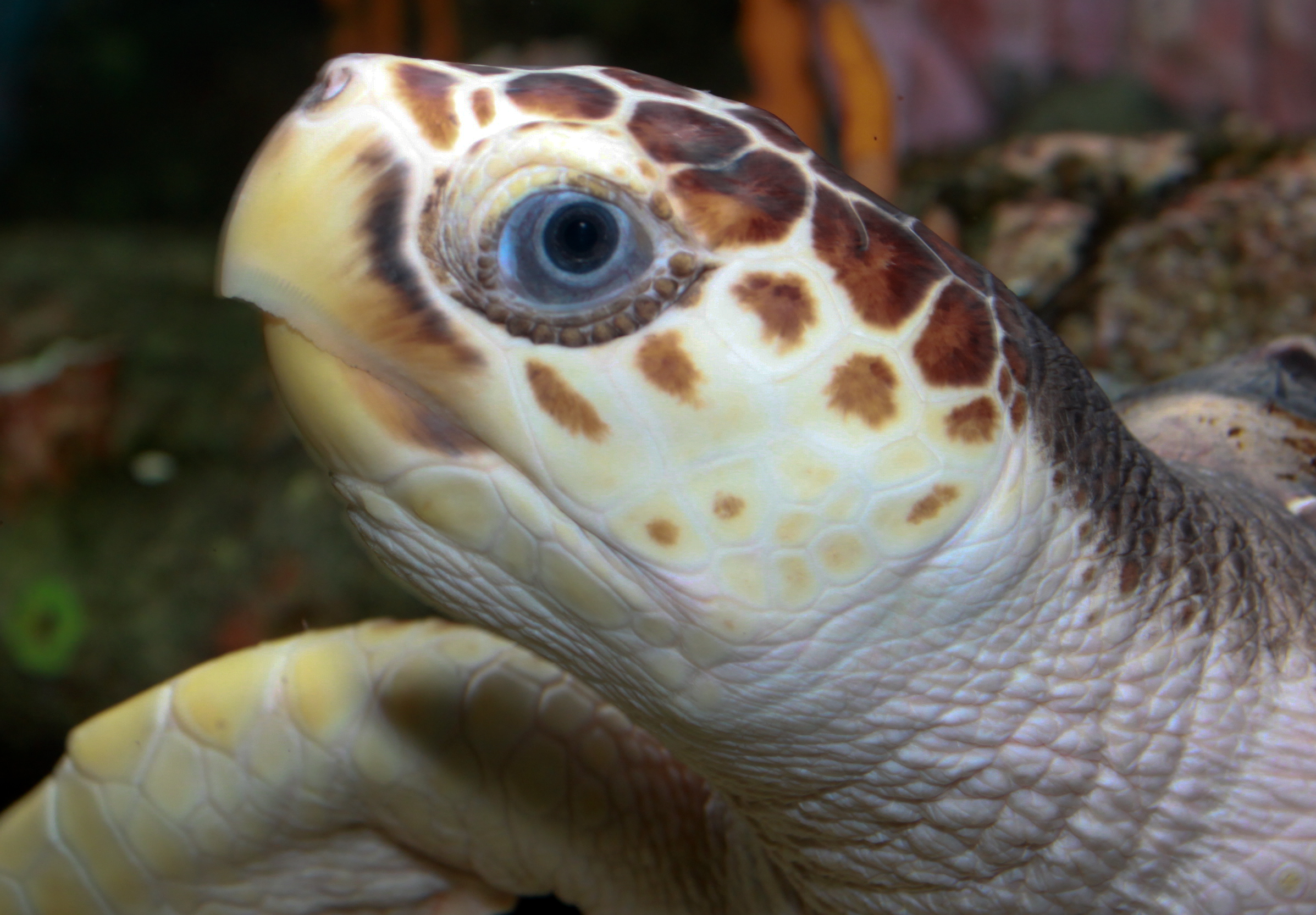 Loggerhead Sea Turtle (Caretta caretta)